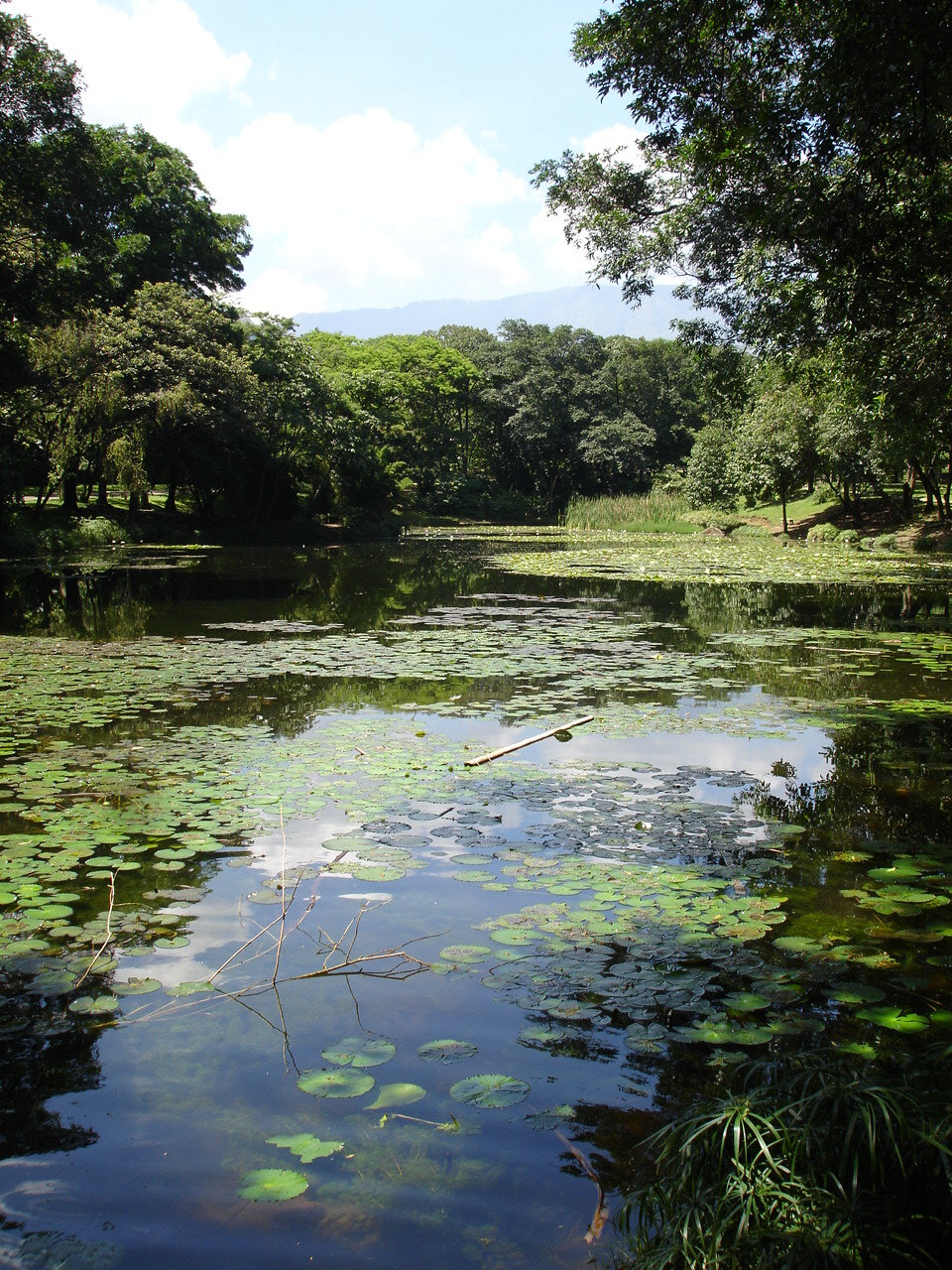 Lago del Jardín Botánico de Medellín, Colombia.